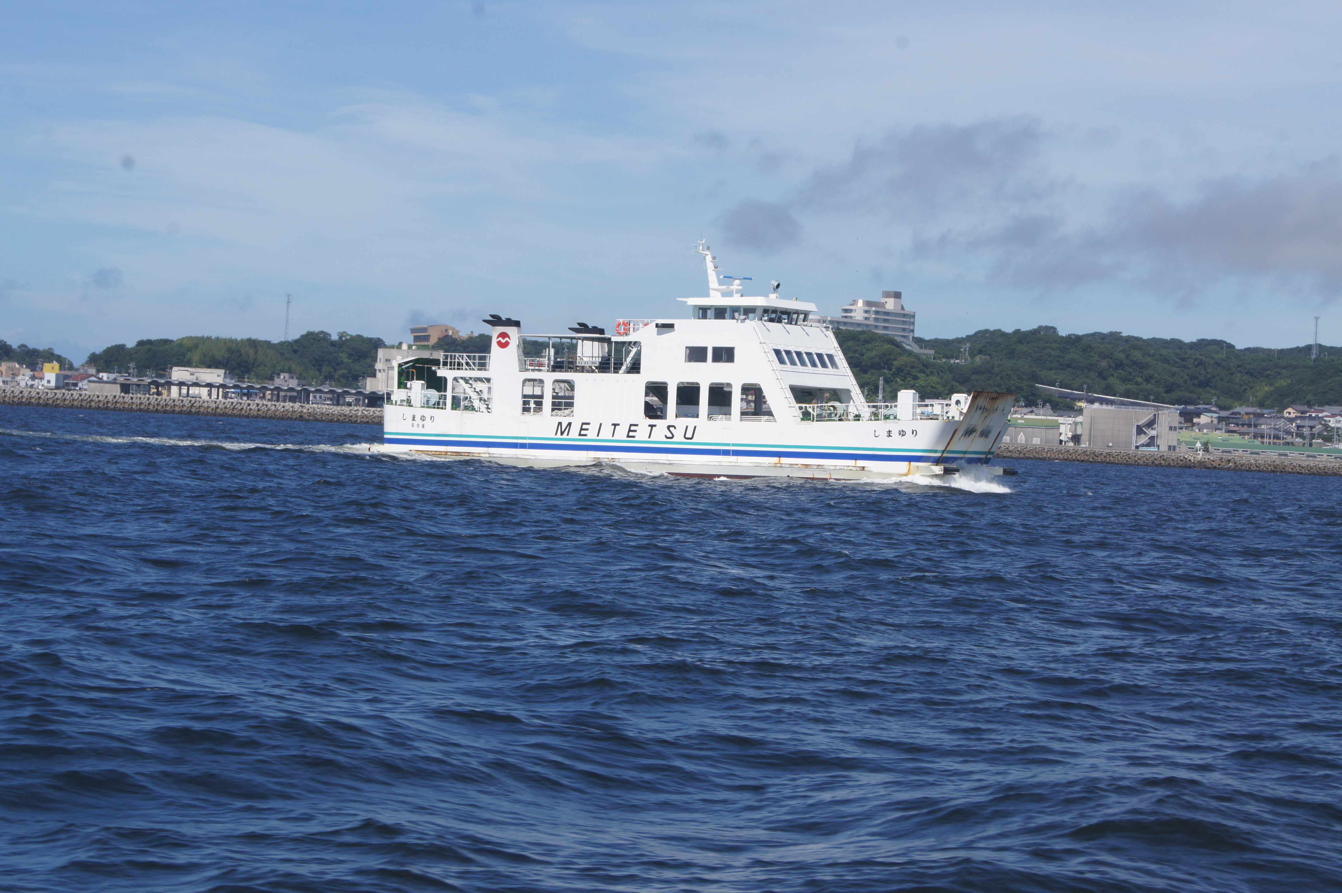 名鉄海上観光船の小型ja:フェリー、「しまゆり」の画像。（三河湾にて撮影）